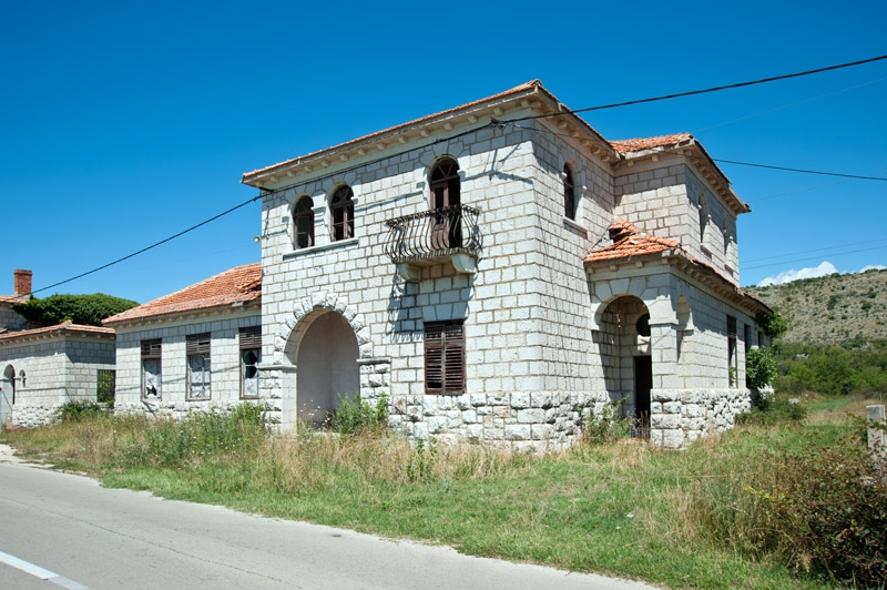 Ivan Meštrović Osnovna škola u Otavicama